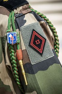 la fourragère du 13e régiment du génie rappelle son engagement pendant les deux guerres mondiales.